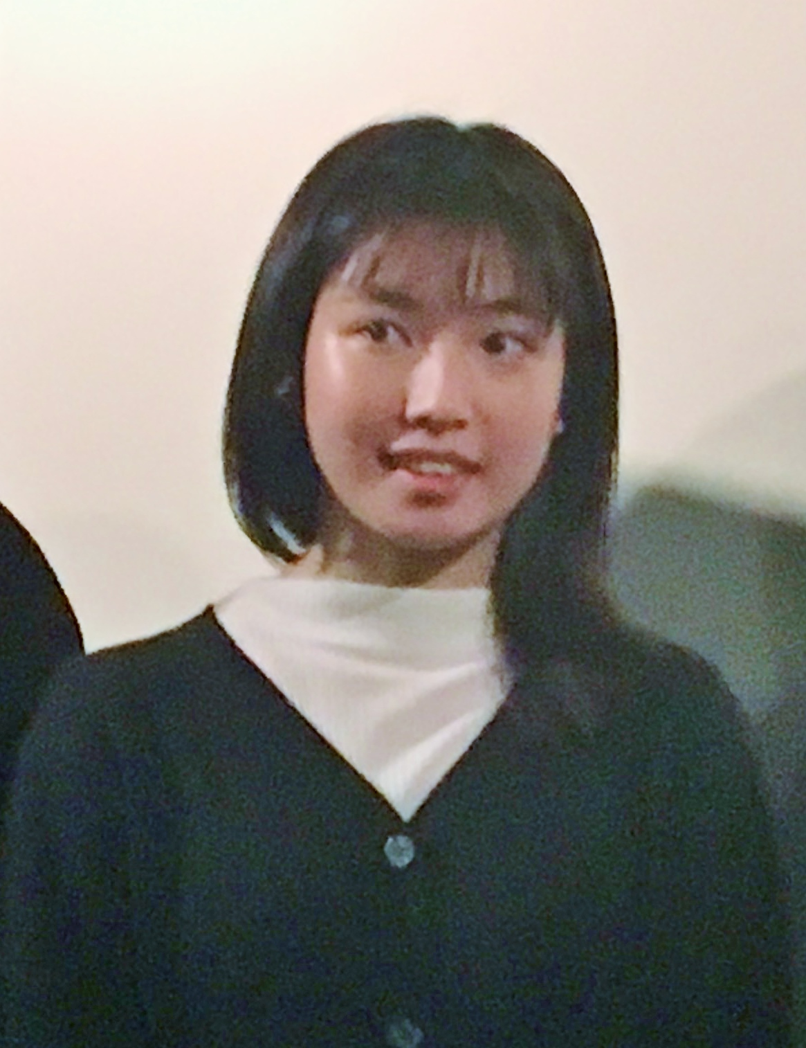 下北沢トリウッドで舞台挨拶を行うSHORT TRIAL PROJECT 2018「アンナとアンリの影送り」アンナ役の小野莉奈（2019年3月17日）